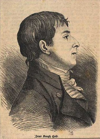 Jens Kragh Høst (15.09.1771–26.03.1844)